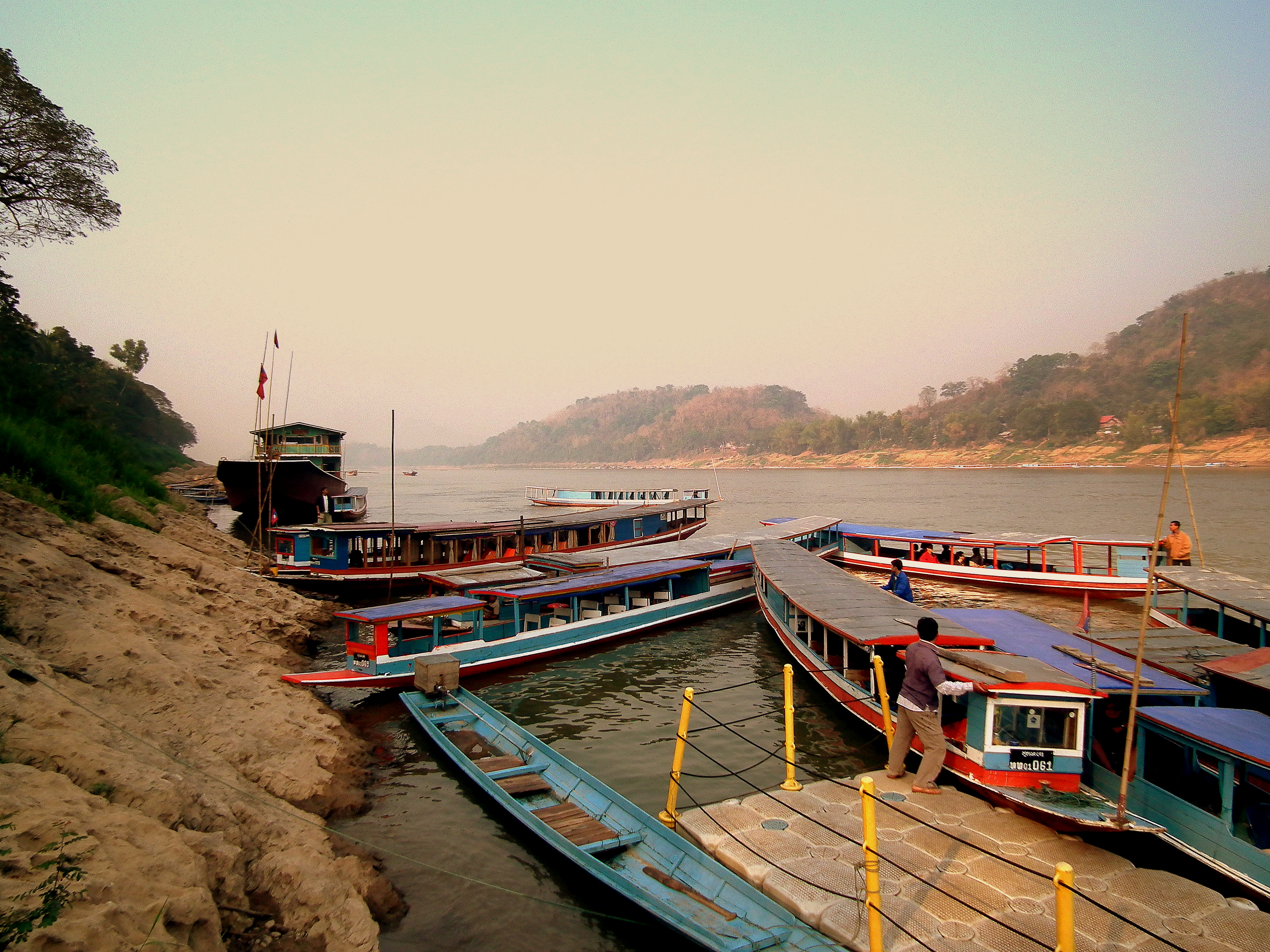 MEEKONG RIVER LUANG PRABANG LAOS FEB 2012